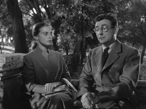 Scena del film